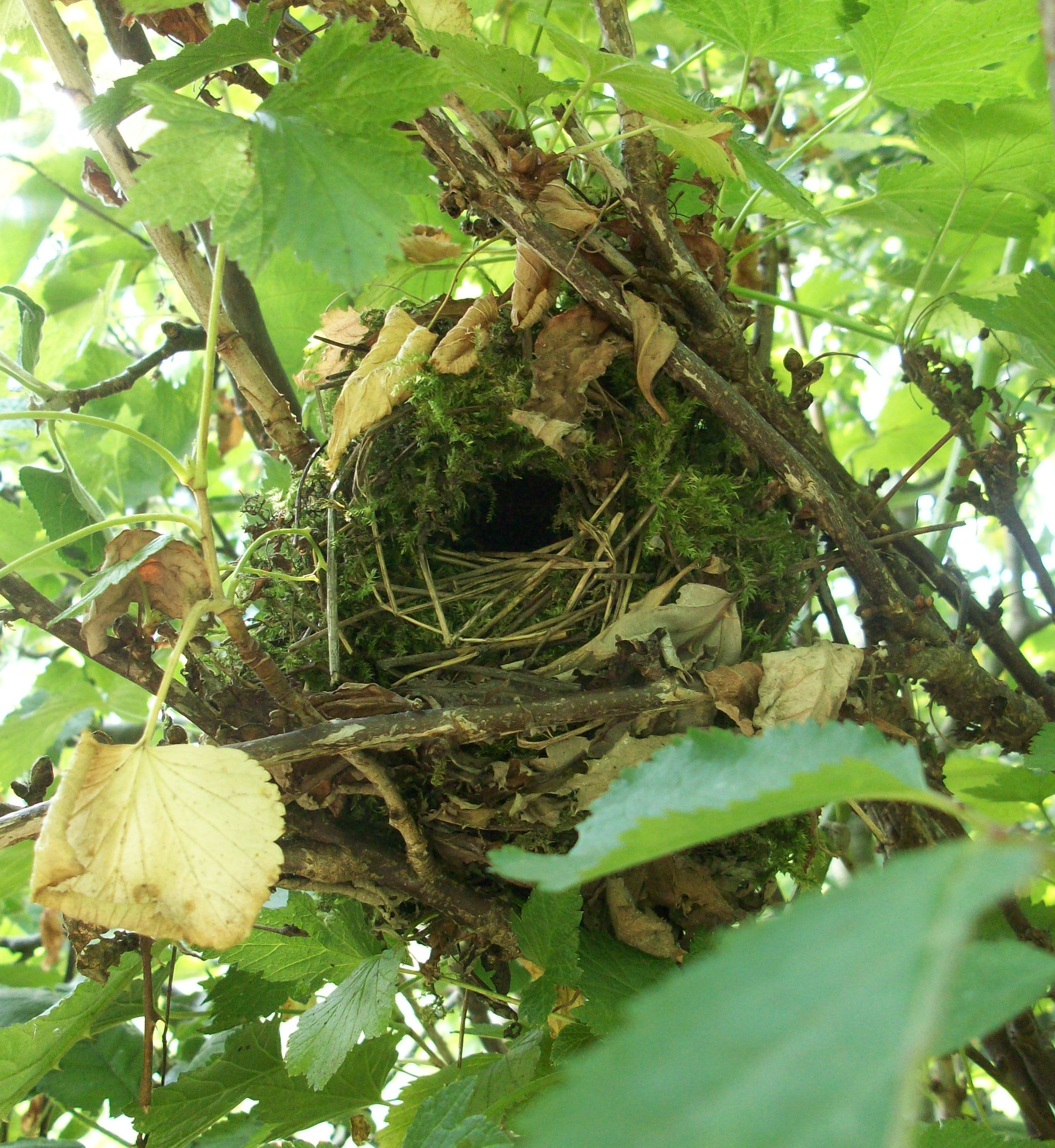 Nid de Troglodyte mignon fabriqué en 2018 dans un jardin potager du 59210 dans des branches de cassissier à environs 80 cm du sol, forme sphérique